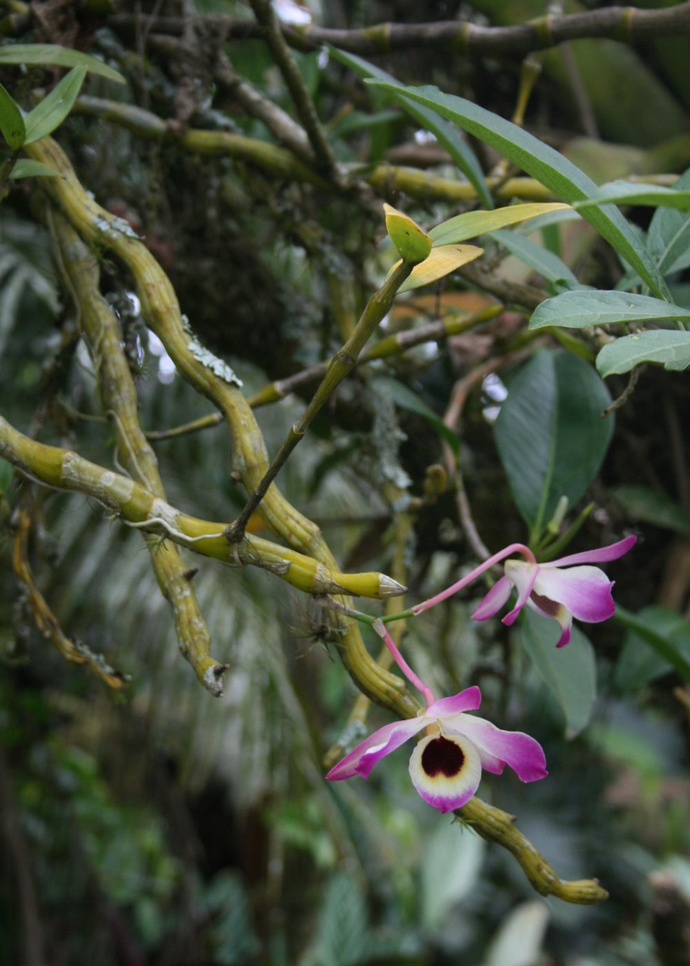 Dendrobium nobile, Orchideen (Orchidaceae) - Costa Rica: Prov. Cartago, Paraíso, Jardín Botánico Lankester/Lankester Botanical Garden